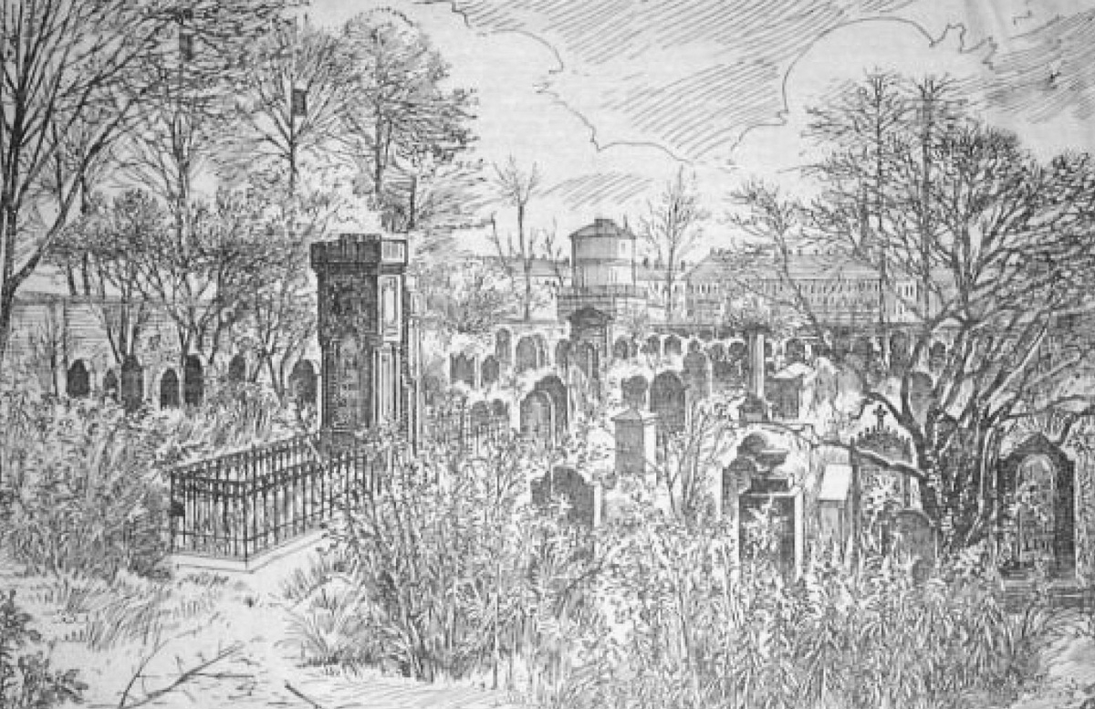 Der erste jüdische Friedhof im Leipziger Johannistal um 1900. Er wurde von 1814 bis 1864 genutzt.